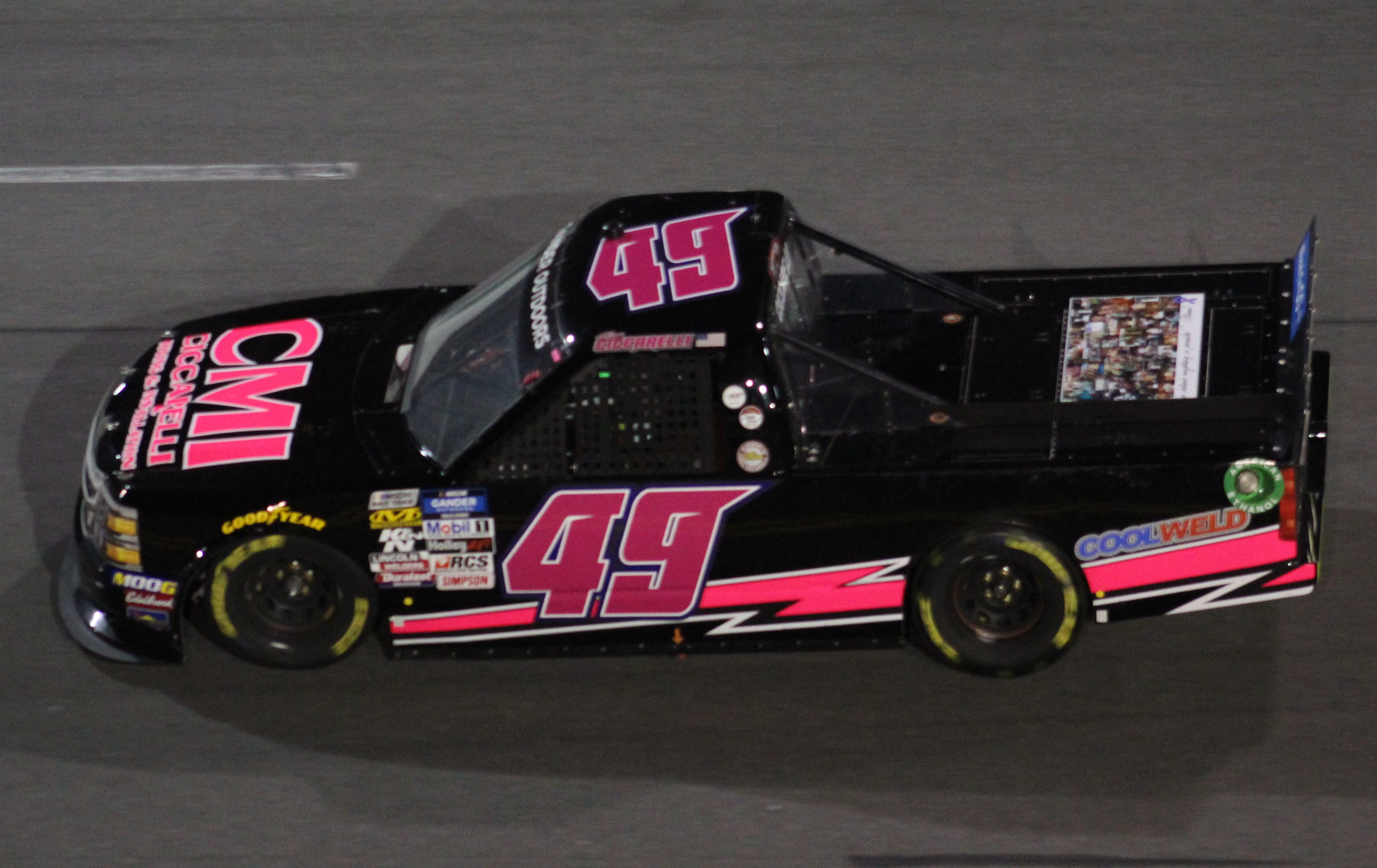 2019 Daytona 500